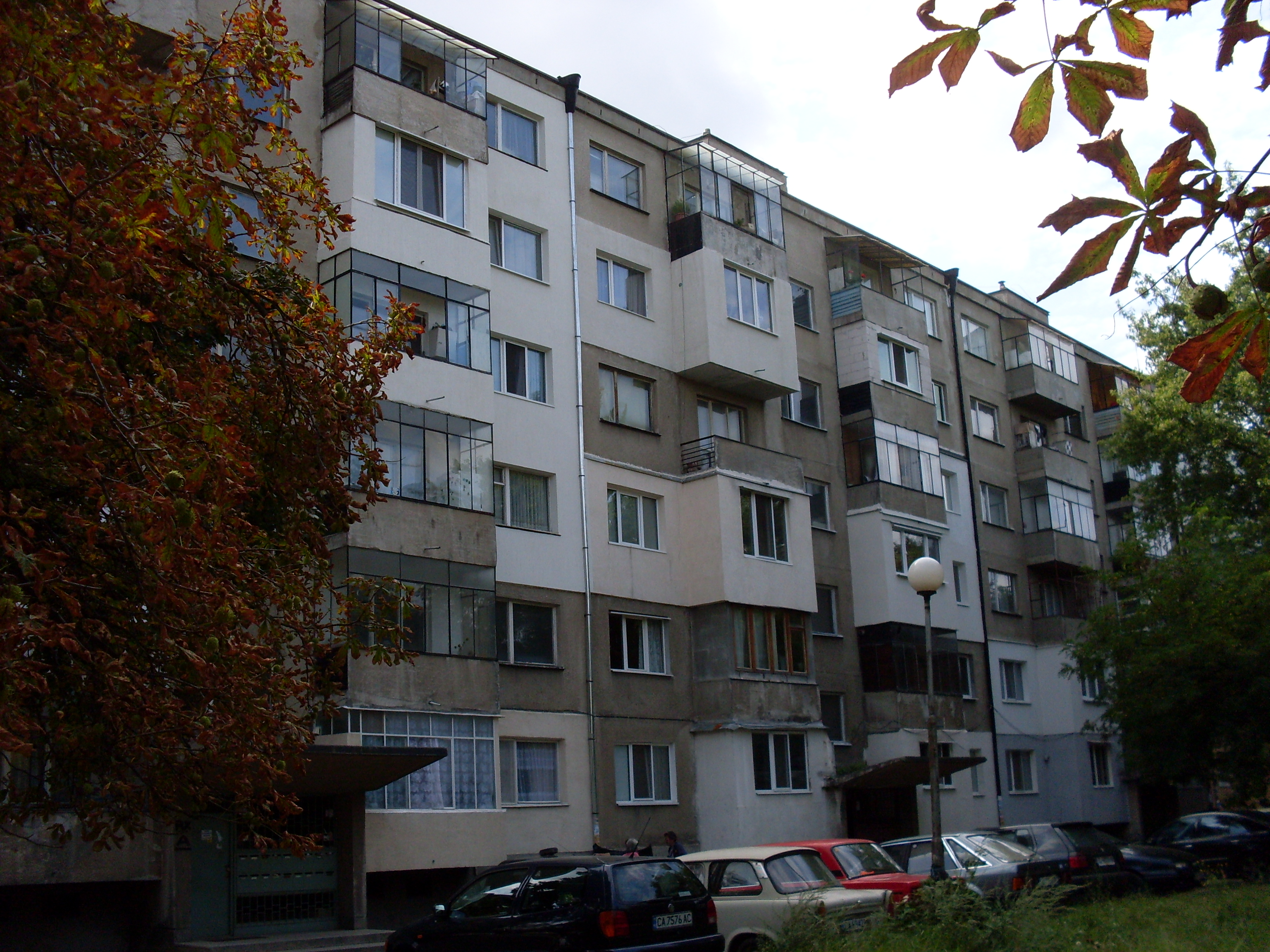 Едропанелна жилищна сграда по номенклатура Бс-2-63 (обединена). Фасада север/запад.